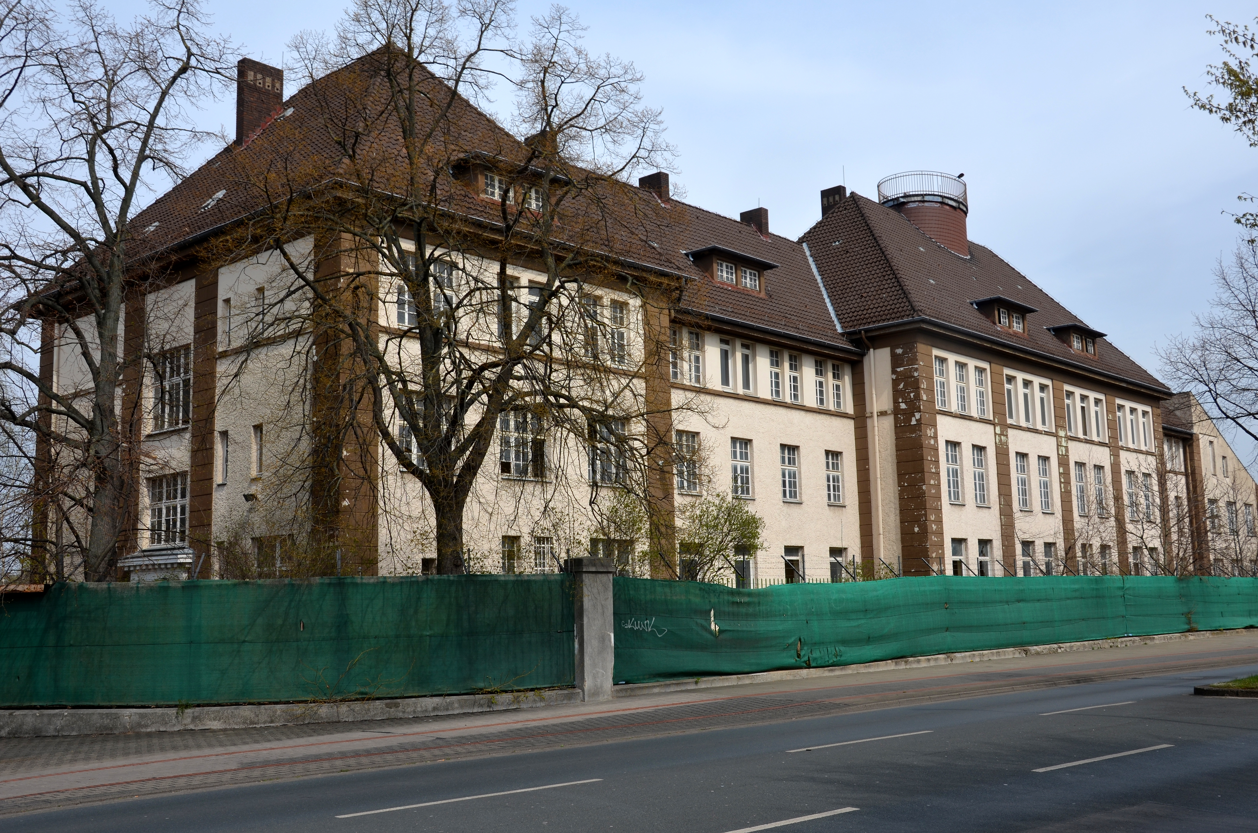 Eines von zwei größeren Gebäuden der bis zum 1. April 1914 bezugsfertigen ehemaligen Fliegerstation (Fliegerkaserne) auf der Vahrenwalder Heide, hier der Hochbau mit der Plattform auf dem Dachfirst. Das Gebäude findet sich heute (Stand: 04/2015) an der Straße Kugelfangtrift am Ende der Lilienstraße. Die Fliegerkaserne, später auch Kraftfahrt-Kaserne, Panzer-Abwehr 19 Heeresoffiziersschule, nach dem Zweiten Weltkrieg und bis zum Abzug der britischen Truppen am Standort auch durch diese genutzt, war zum Zeitpunkt dieser Foto-Aufnahme (am 14. April 2015) offenbar ungenutzt. Nicht zuletzt aufgrund der wohl nicht nur 2015 bestehenden Probleme bei der Unterbringung und Wohnraumbeschaffung für die vielen in Deutschland und Hannover ankommenden Flüchtlinge ein schwer erträglicher Zustand ..